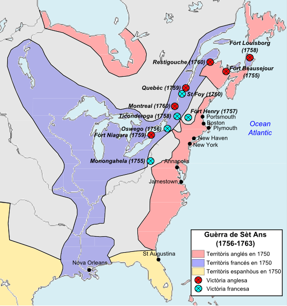 Teatre d'America dau Nòrd de la Guèrra de Sèt Ans (1756-1763).